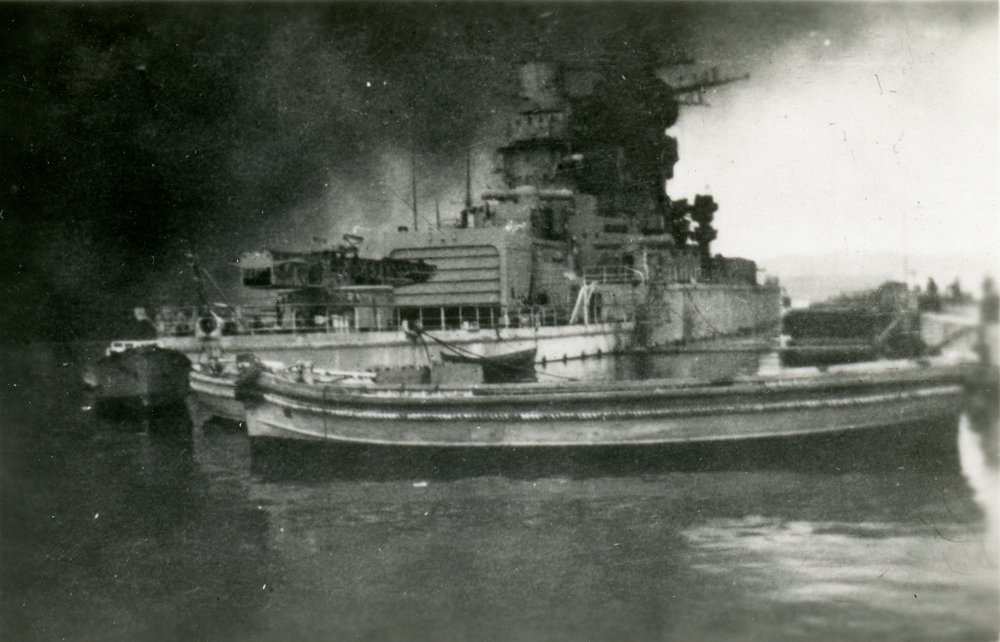 Vue du sabordement de la Flotte à Toulon le 28 novembre 1942. Il s'agit du Strasbourg